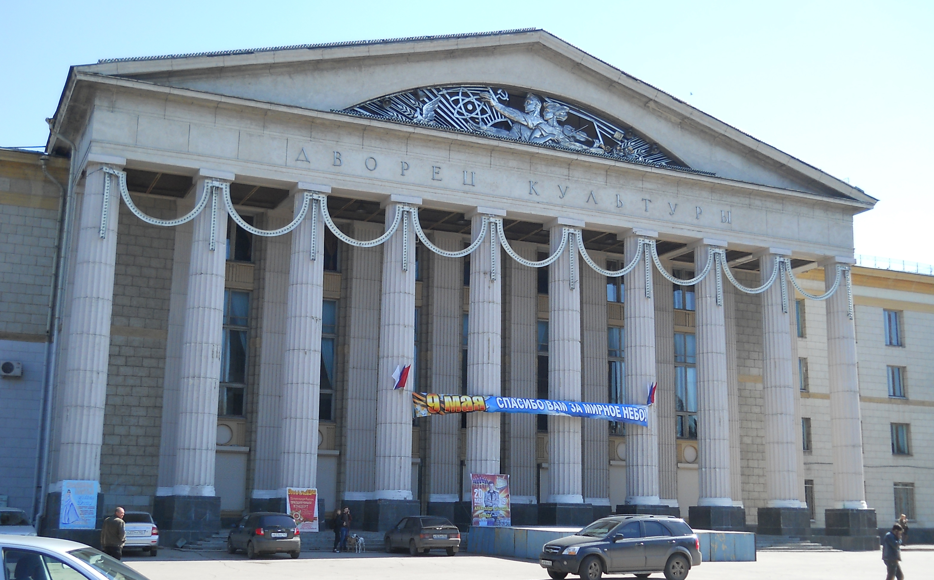 Дворец культуры на площади им. Кирова